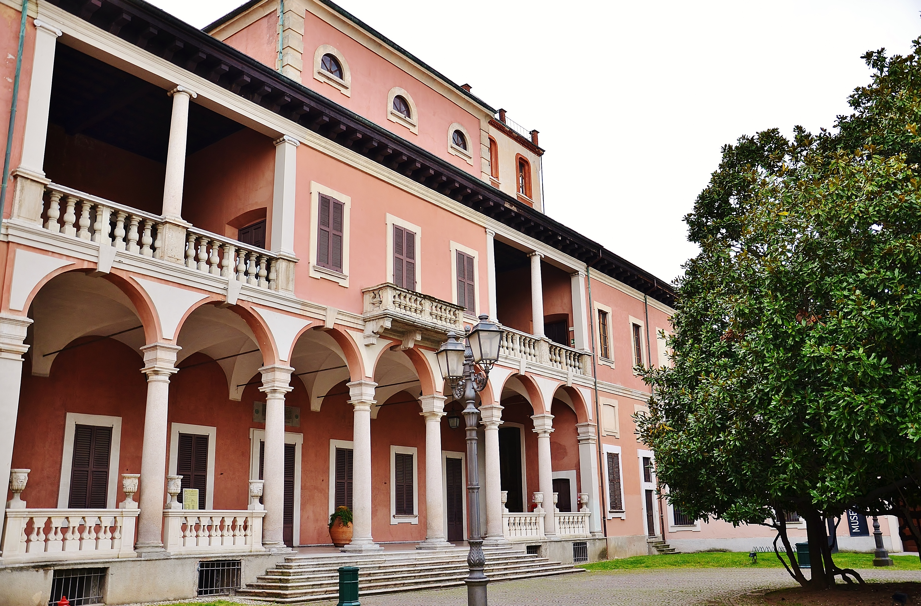 Villa Ghirlanda Silva (solo esterni) This is a photo of a monument which is part of cultural heritage of Italy.